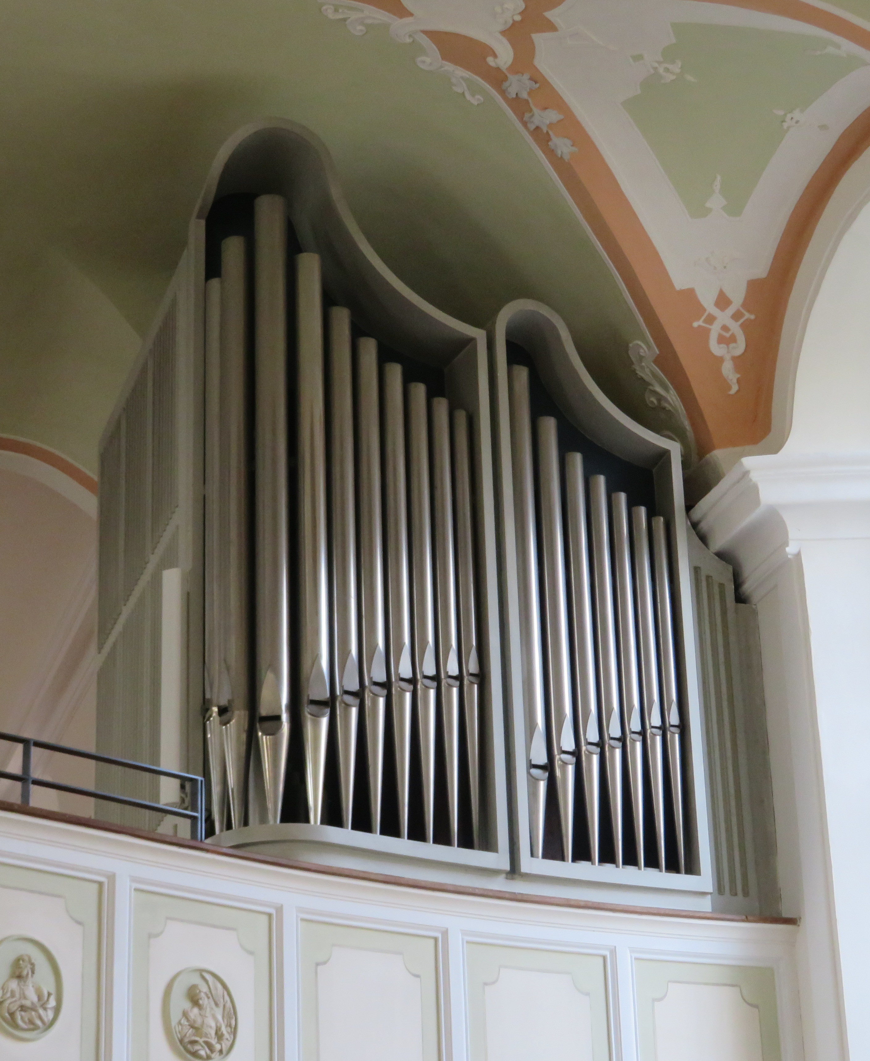 Detail der Reiser-Orgel (1972) in der kath. Pfarrkirche St. Martin Unterkirchberg